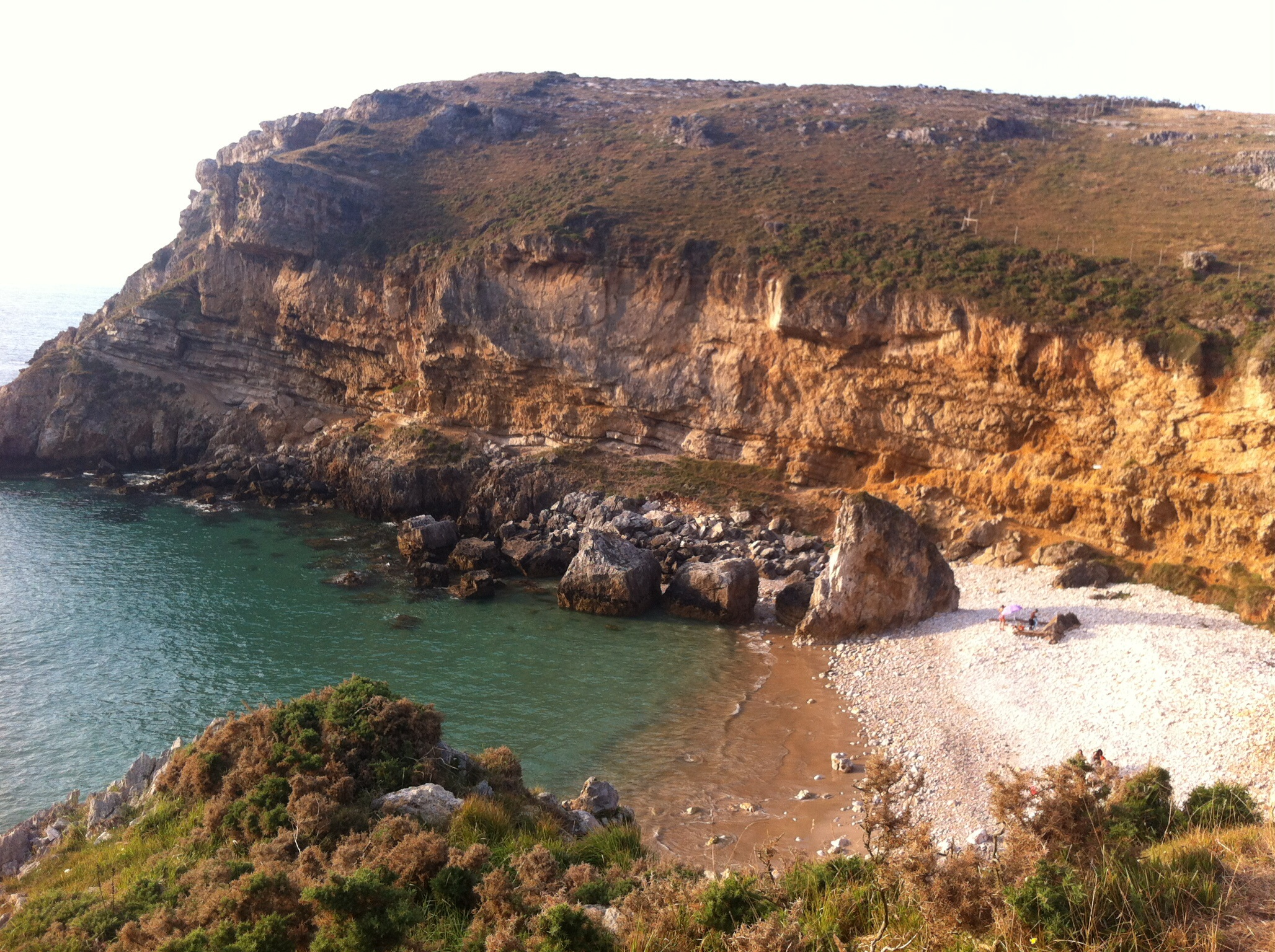 Playa La Fuente, en Santillán, Cantabria